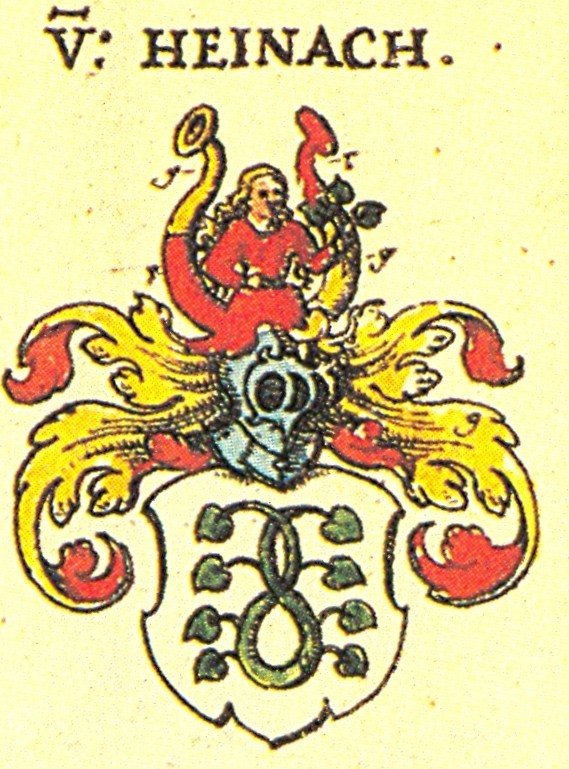 Ritterschaft und Adel in Franken von Heinach